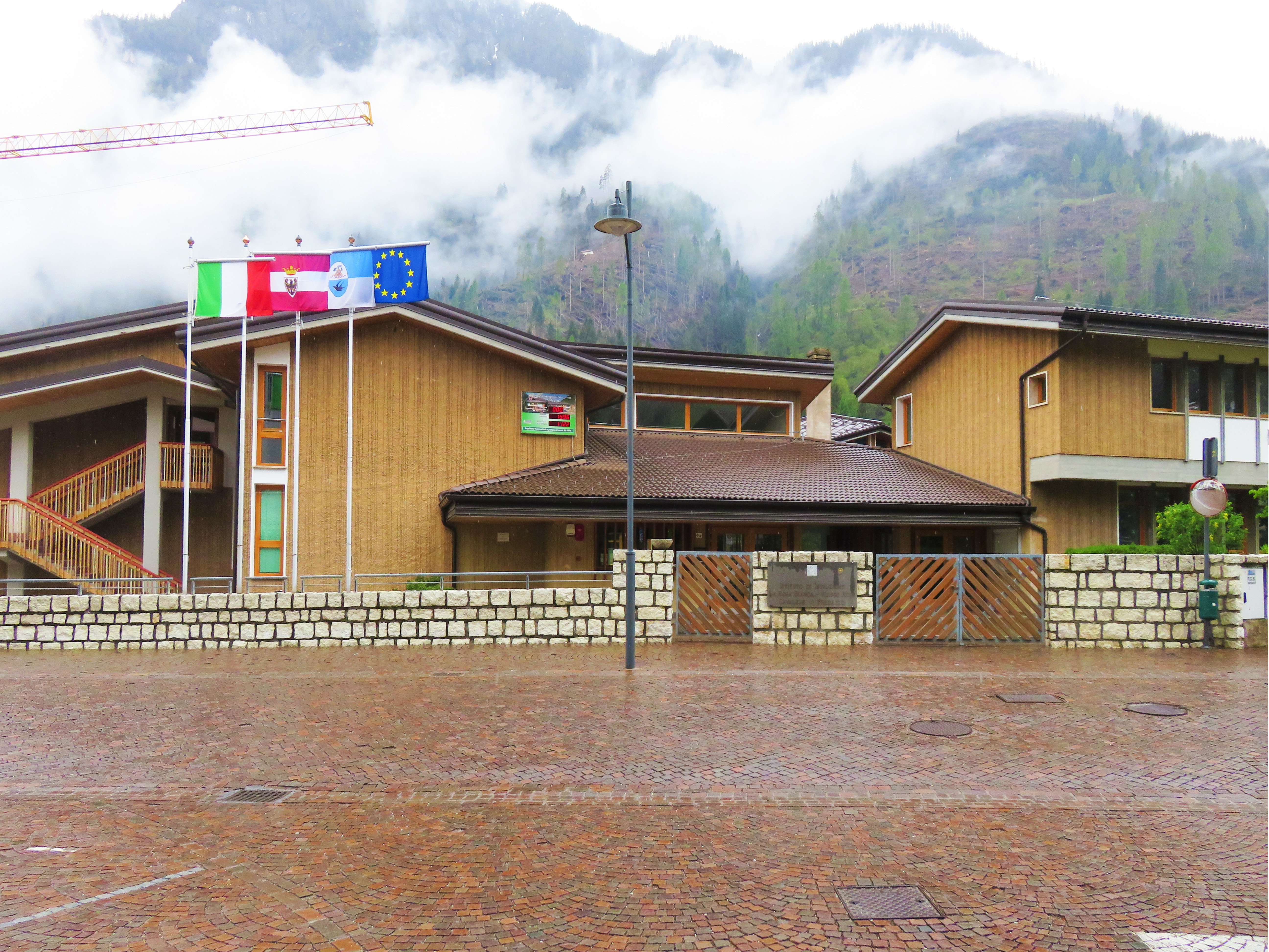 Scuola secondaria di secondo grado di Predazzo